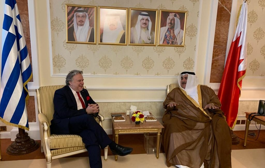 Συνάντηση ΥΠΕΞ Γ. Κατρούγαλου με με ομόλογό του Μπαχρέιν Shaikh Khalid bin Ahmed bin Mohammed Al Khalifa